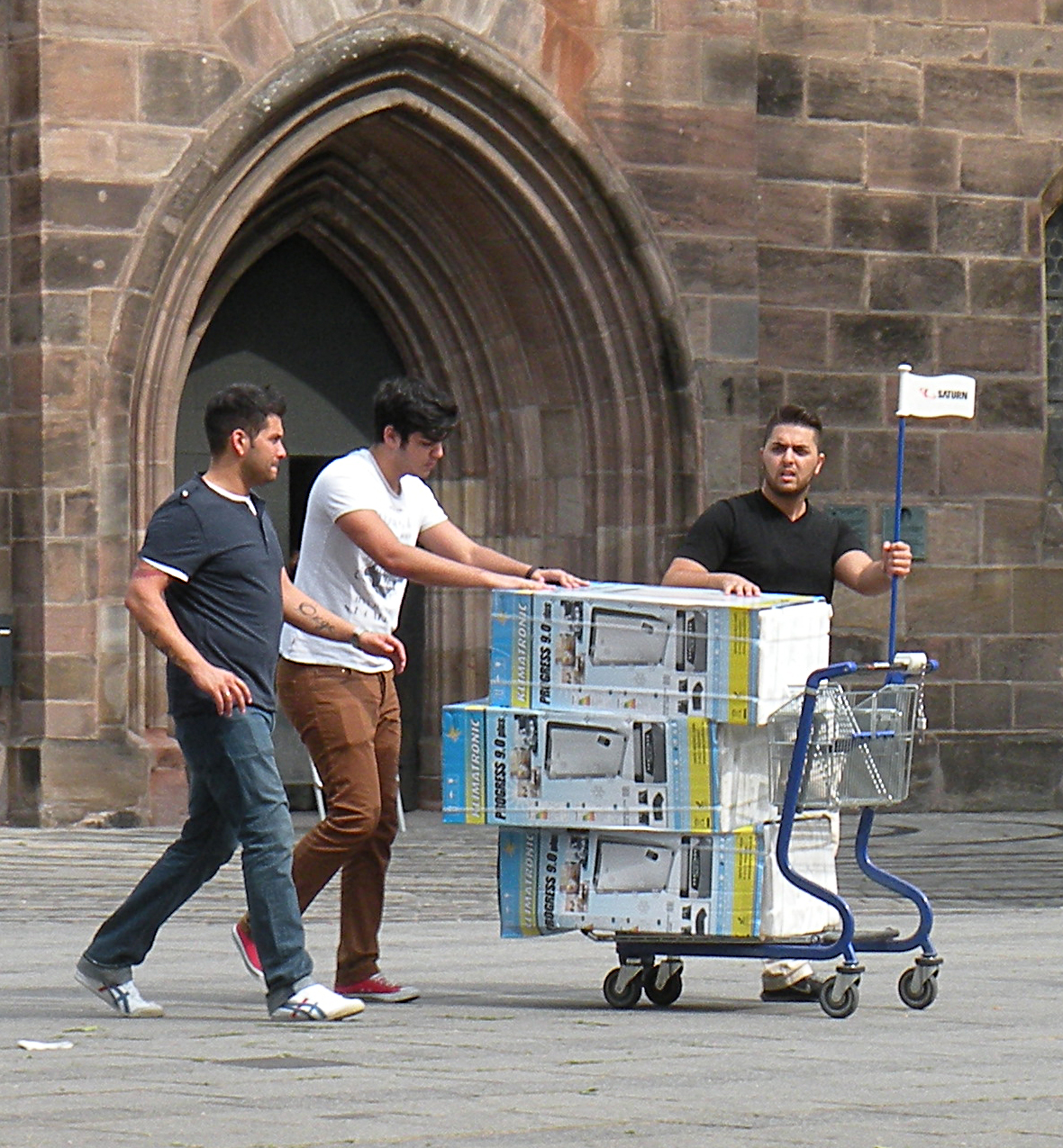 Baggage cart